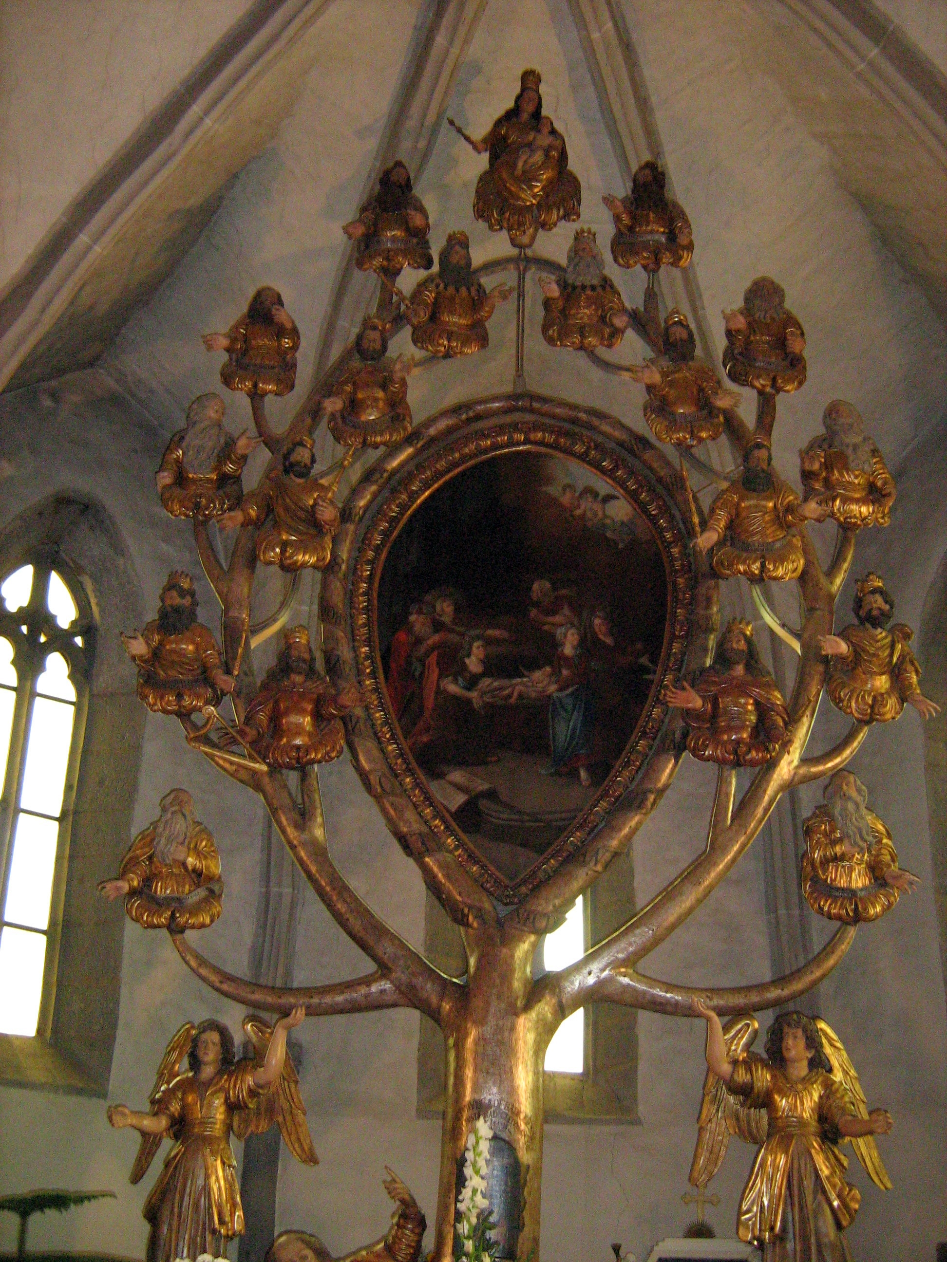 Gyöngyöspata. Kisboldogasszony római katolikus templom.- A Jesse-oltár: Jézus családfáját mutatja be, egyedülálló műemlék. A nyolc méter magas, mozgalmas, sokalakos oltár (dél-lengyelországi?) a 17. század közepéről (1653?). Az oltáron fekvő Jesse életnagyságú törzséből fa sarjad, ágain bibliai királyok és próféták — köztük Salamon és Dávid — dús aranyozású, festett szobrai felett koronás Mária trónol, karján a kisdeddel. A fa törzsén iratszalagok kígyóznak az Énekek énekéből vett idézetekkel. A kétoldalt felnyúló ágak koszorúként ölelik át a Mária születésének oltárképet a fa közepén. A fa törzse ezüst színű, az ágak aranyozottak.